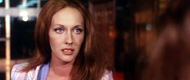 Screenshot del film Gatti rossi in un labirinto di vetro (1975) di Umberto Lenzi.